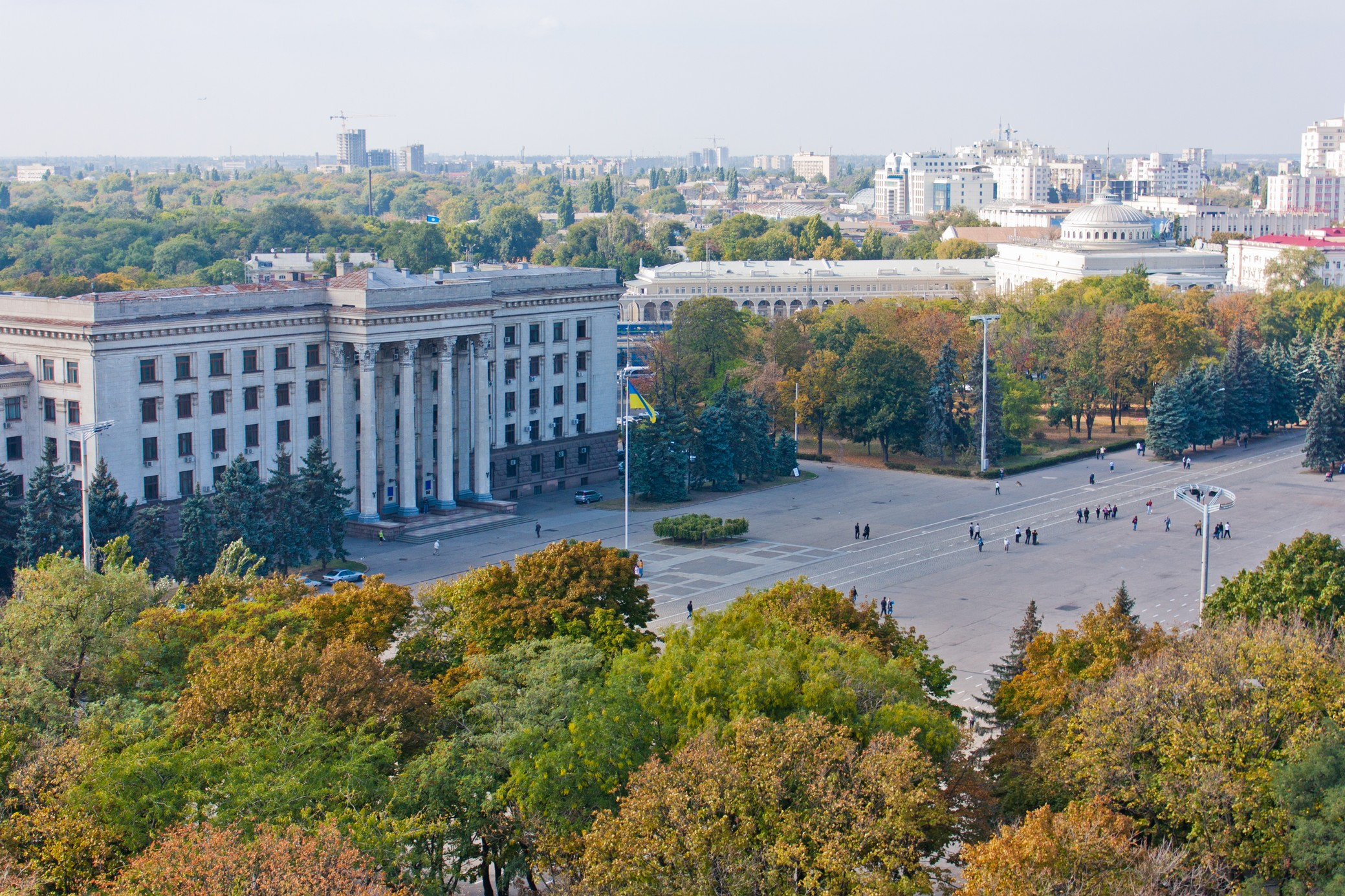 Адміністративна споруда, Одеса, Куликове поле, 1